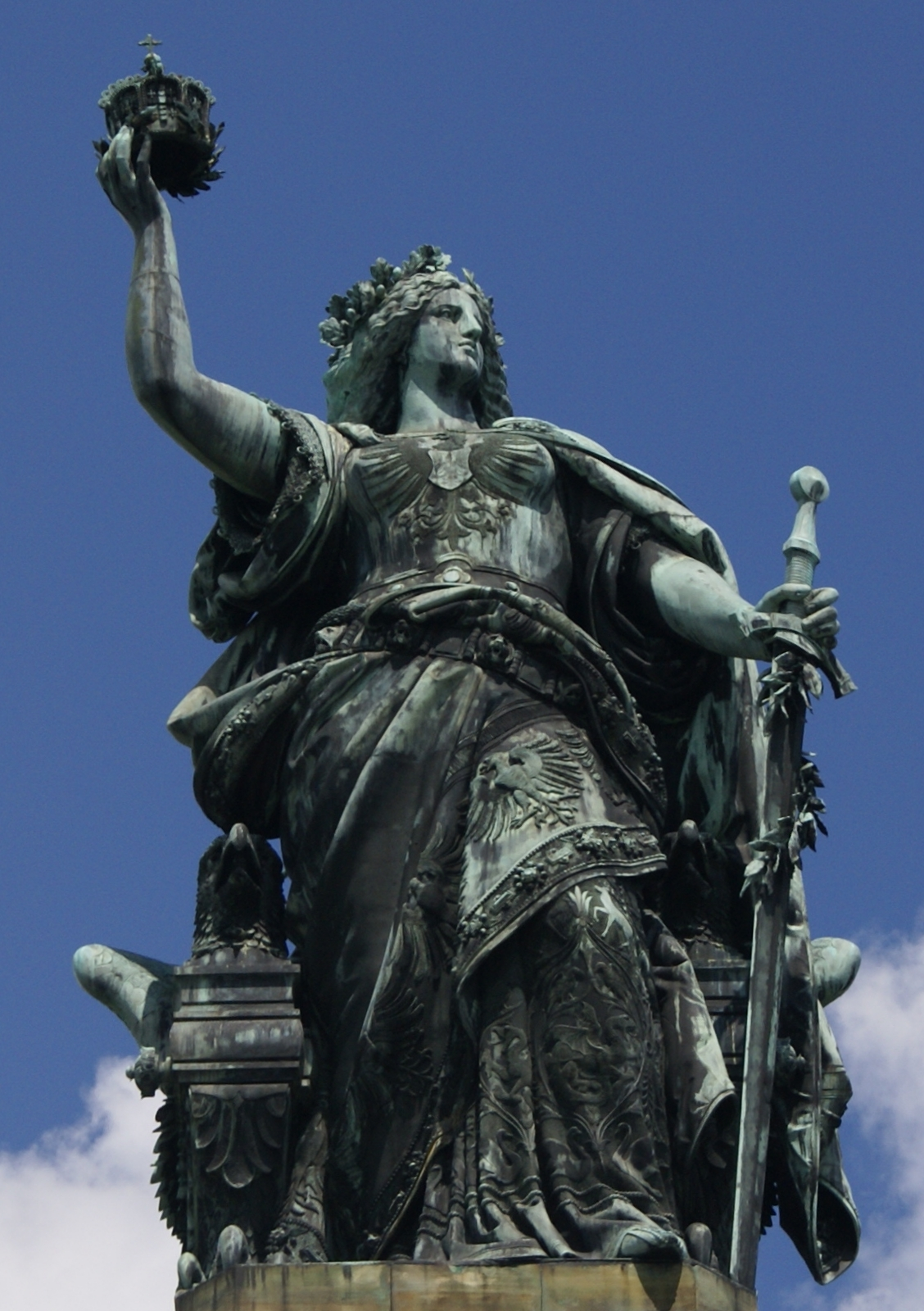 Niederwalddenkmal Rüdesheim: Die Figur der Germania